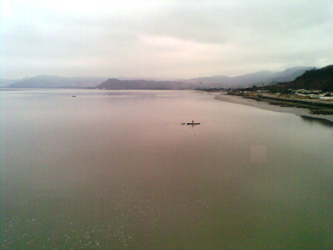 Desembocadura del Río Chone en la peninsula de Bahía de Caraquez.